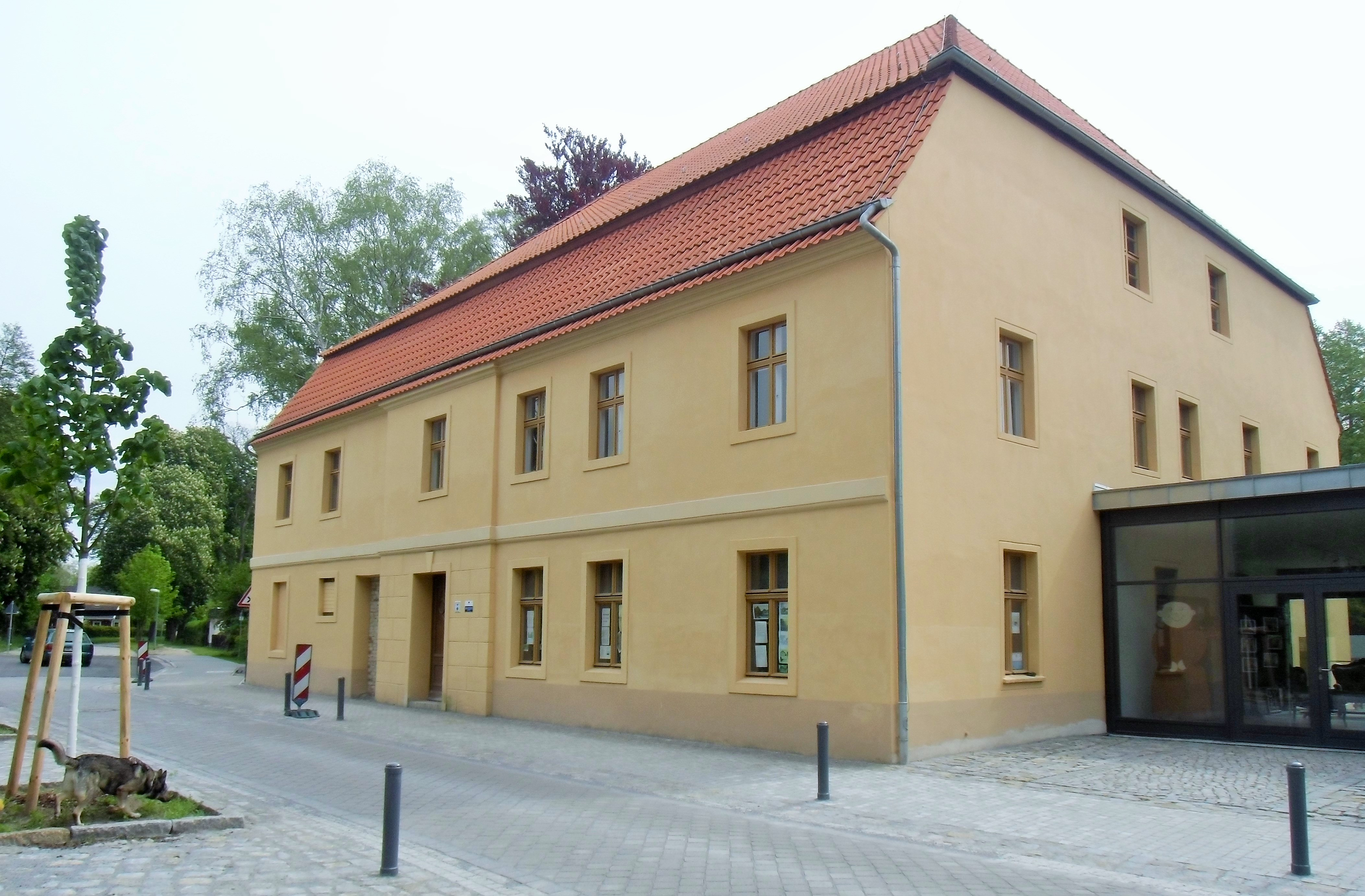 Denkmalgeschützte Wassermühle am Tegeler Fließ in der Gemeinde Mühlenbecker Land, Landkreis Oberhavel,Stand nach der Sanierung Mai 2015